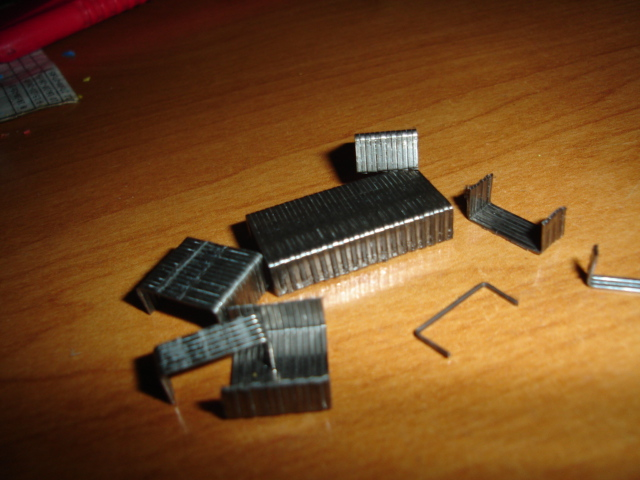 Zszywki